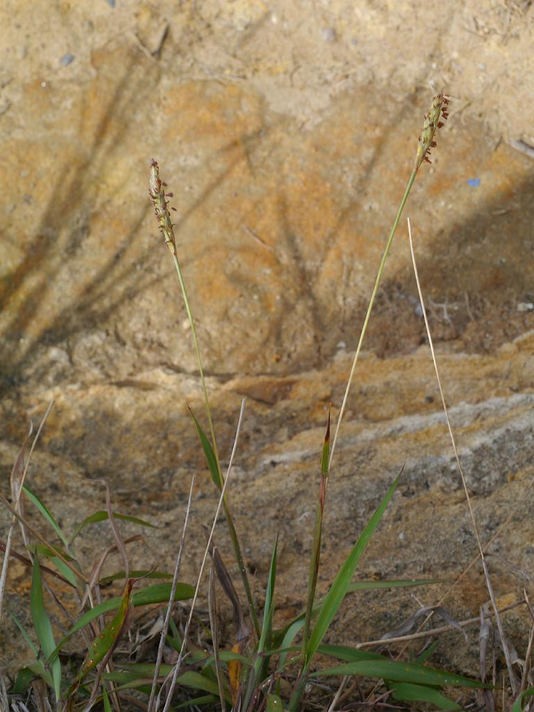 Ischaemum aristatum var. glaucum：カモノハシ 和歌山県白浜町：shirahama town, Wakayama pref. Japan 2013/09/14